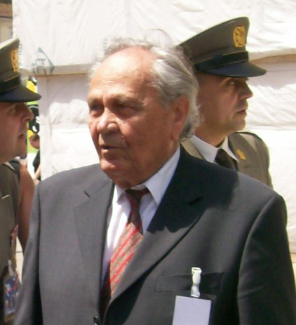 Josip Manolić